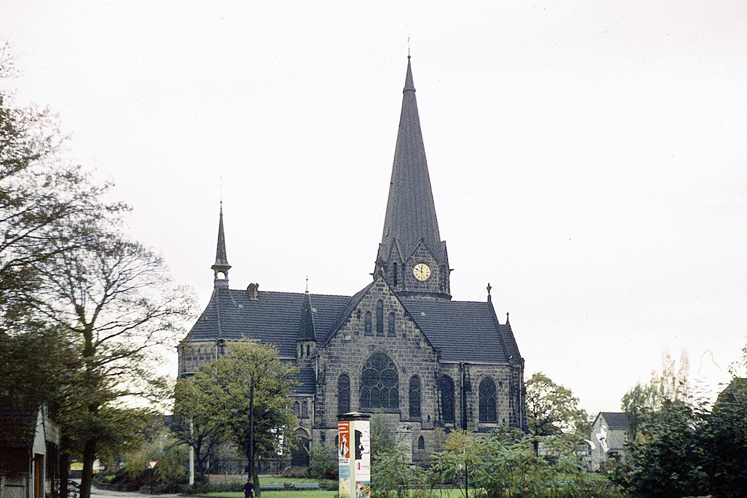 Ev. Luther-Kirche zu Dortmund-Asseln, 1960, aufgenommen von der Straße "Am Hagedorn" aus This is a photograph of an architectural monument. 0189